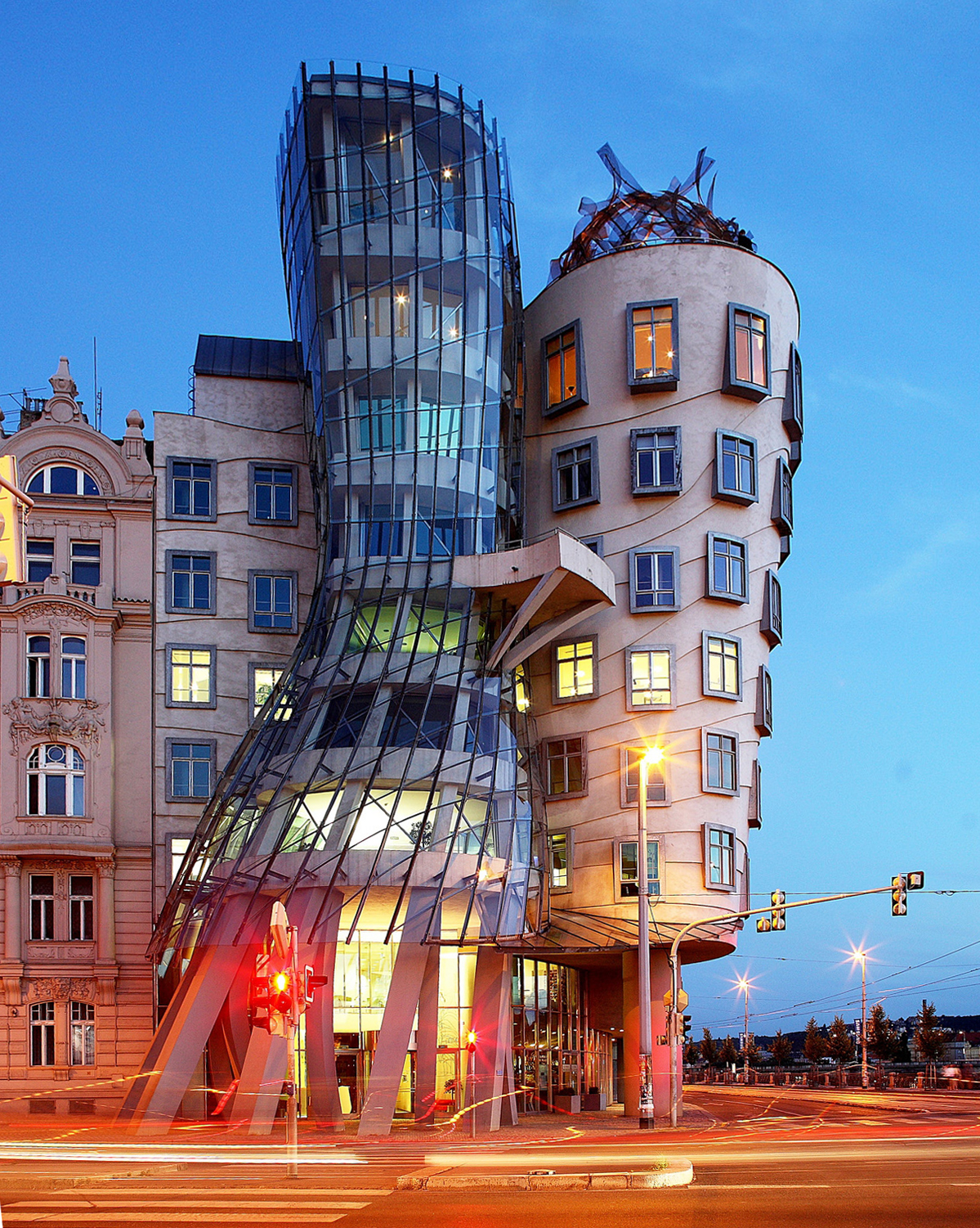 Le case danzanti di Praga, altrimenti note come "Ginger e Fred" oppure come Tančící dům. Canon 5D+24L/1.4 1.3s f/5.6 250ISO gorillapod-on-a-lightstand